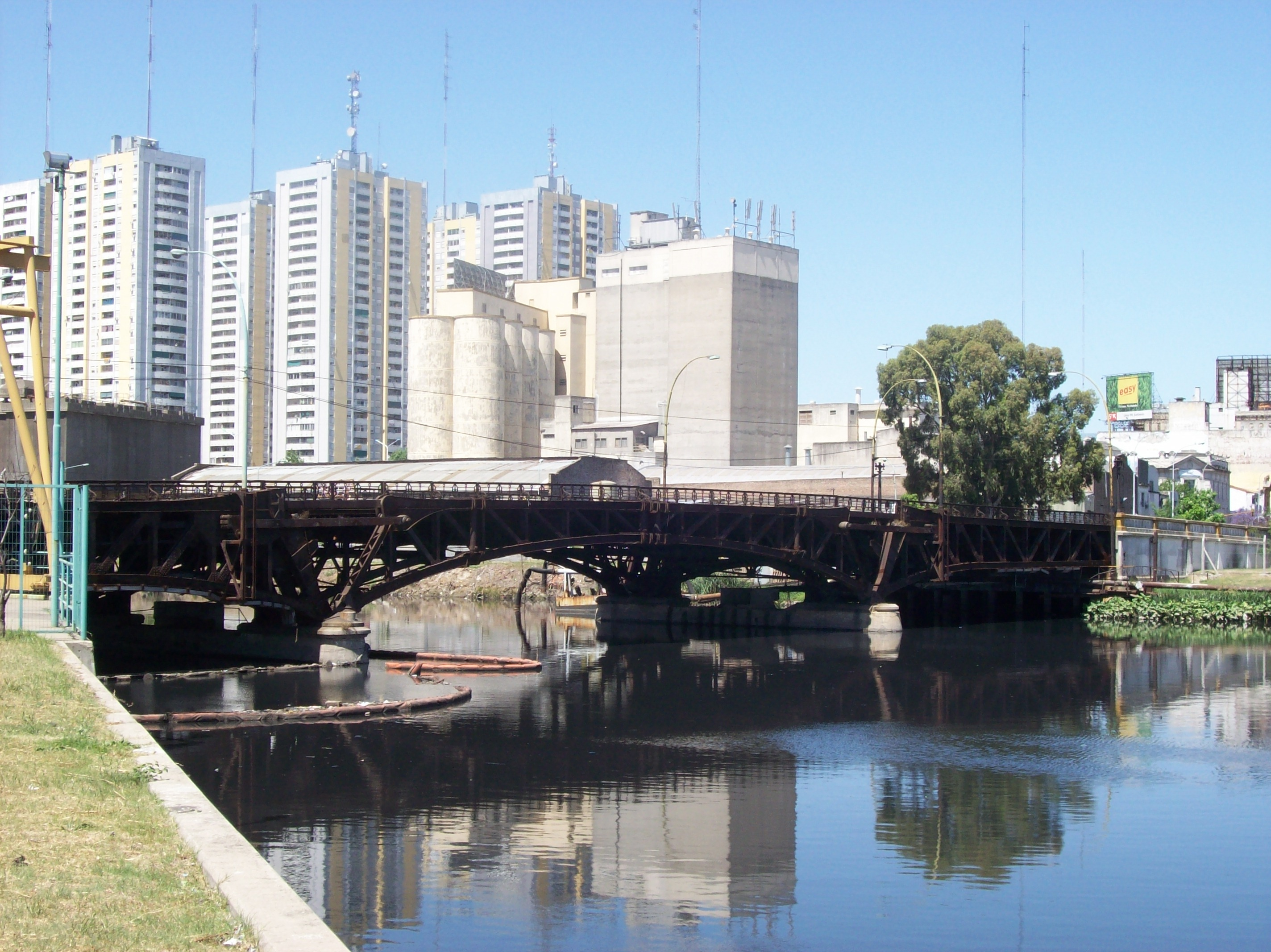 Viejo Puente Pueyrredón sobre el Riachuelo, que une el barrio porteño de Barracas y la ciudad de Avellaneda.